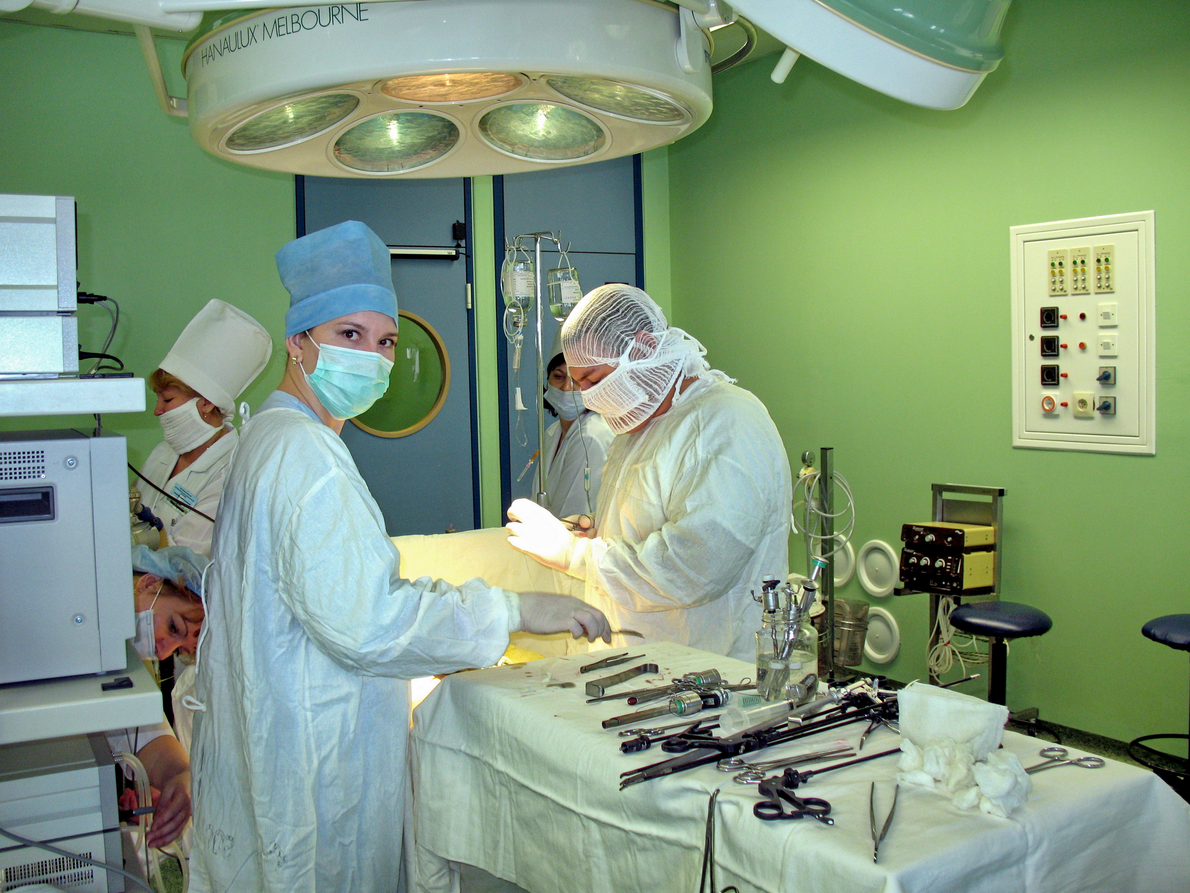 Операционный зал в Городской больнице №1. Норильск